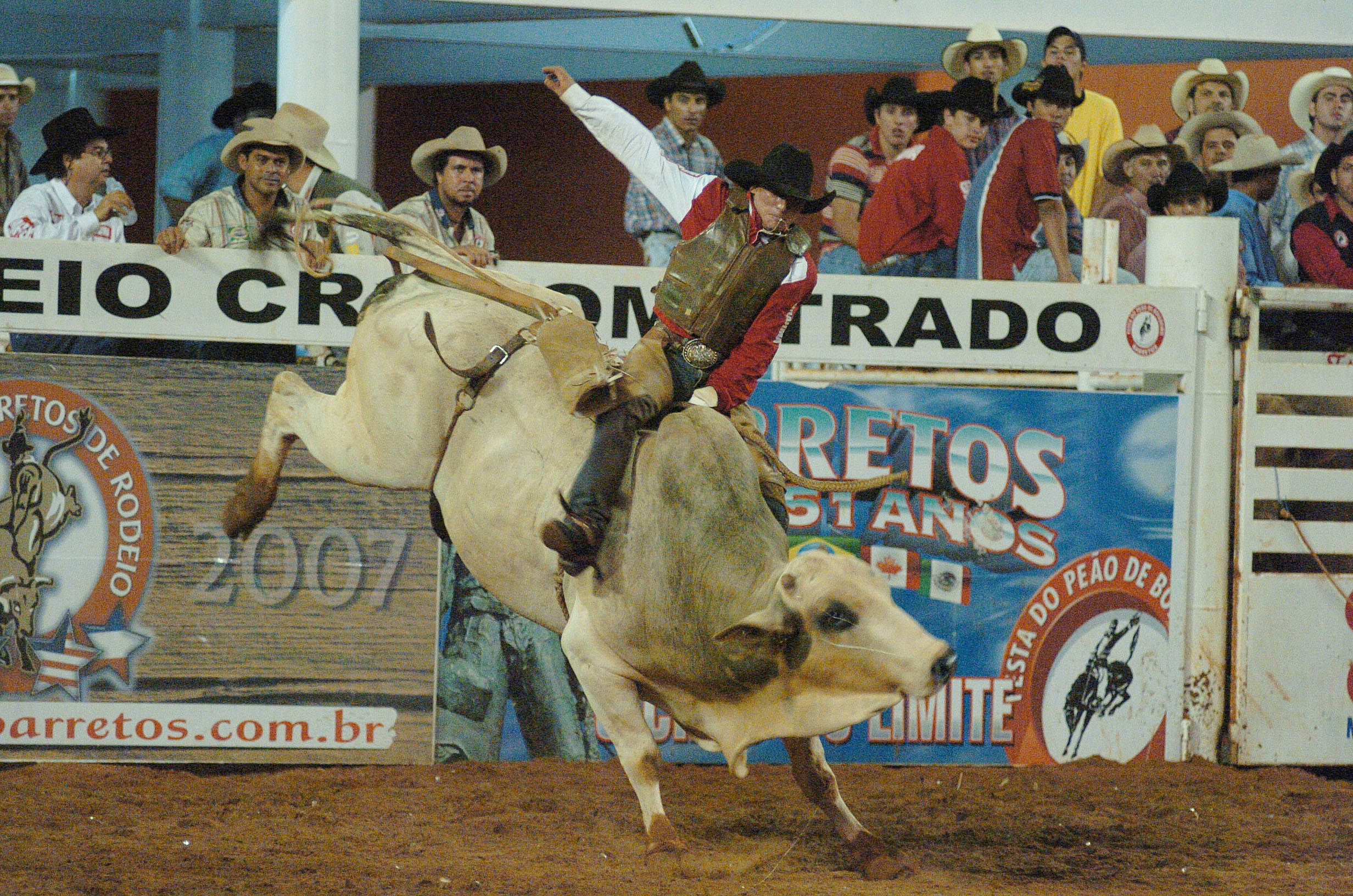 "Festa do Peão de Boiadeiro em Barretos" rodeio in Barretos, Brazil.